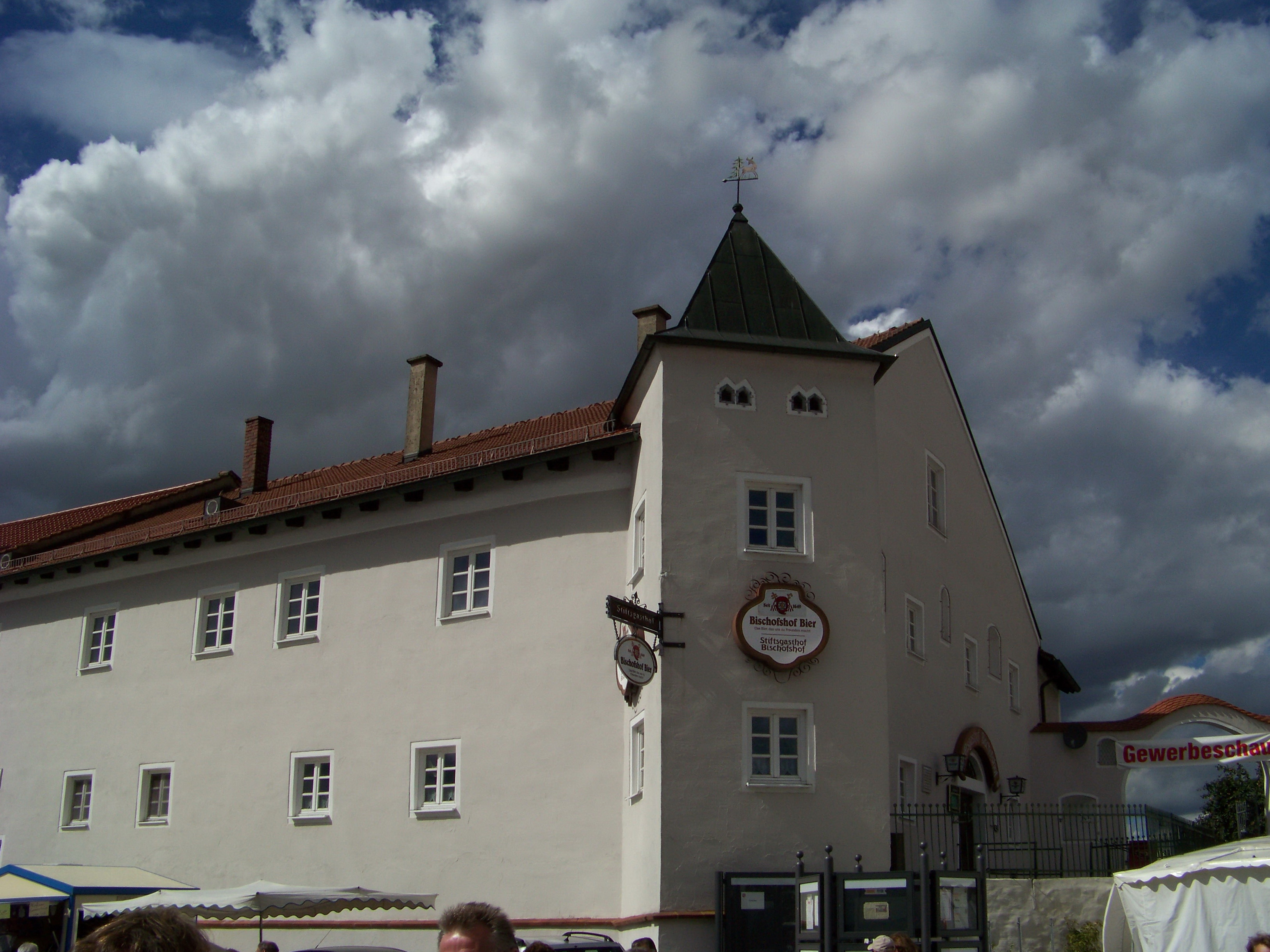 Aufhausen, Hofmark 1. Ehem. Pflegerhaus, später Gasthaus, zweigeschossiger und traufständiger Satteldachbau mit Eckerker und Hoftor, 17. Jahrhundert.